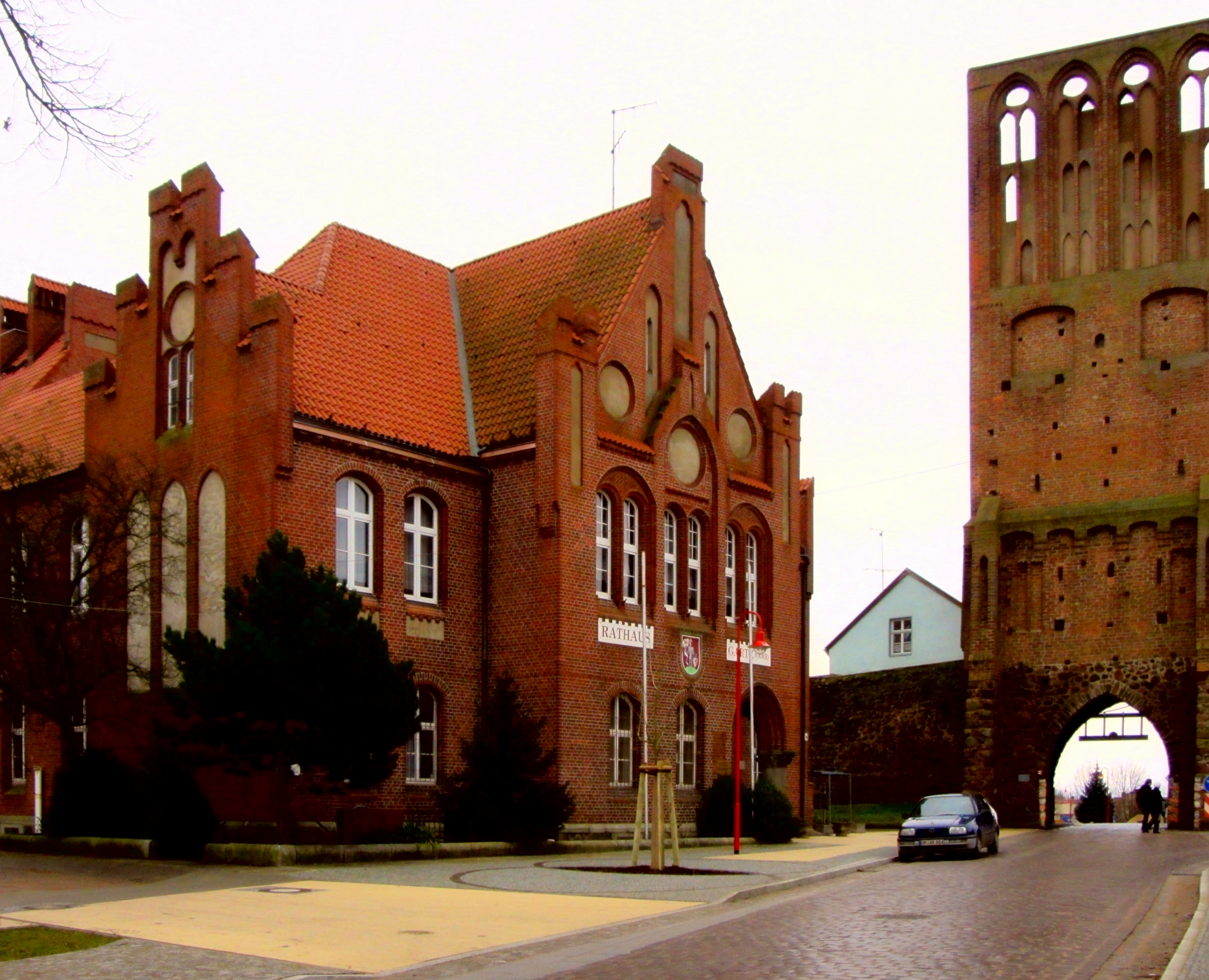 Gartzer Rathaus und Vorpommerisches Amt.